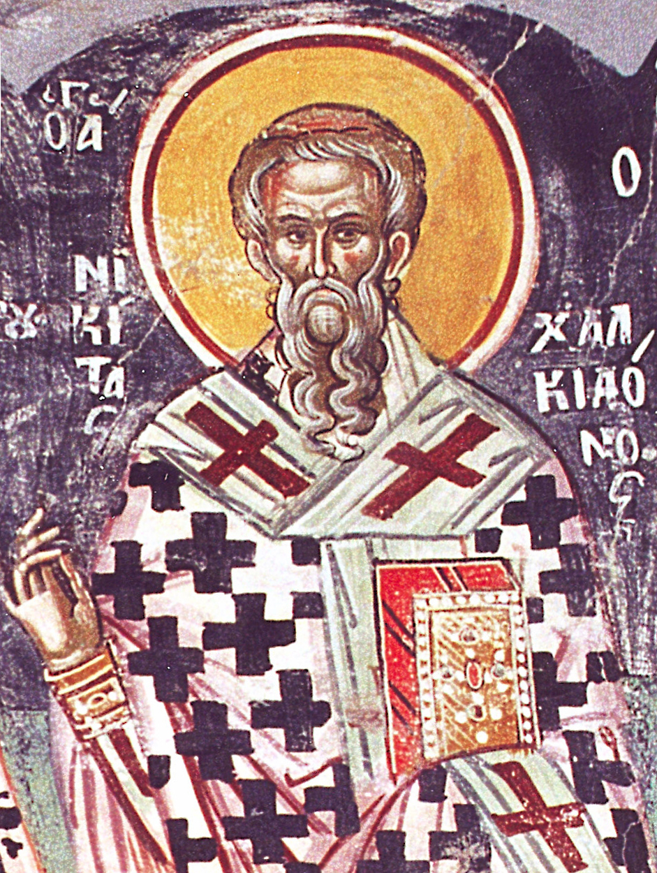 Никита Халкидонский